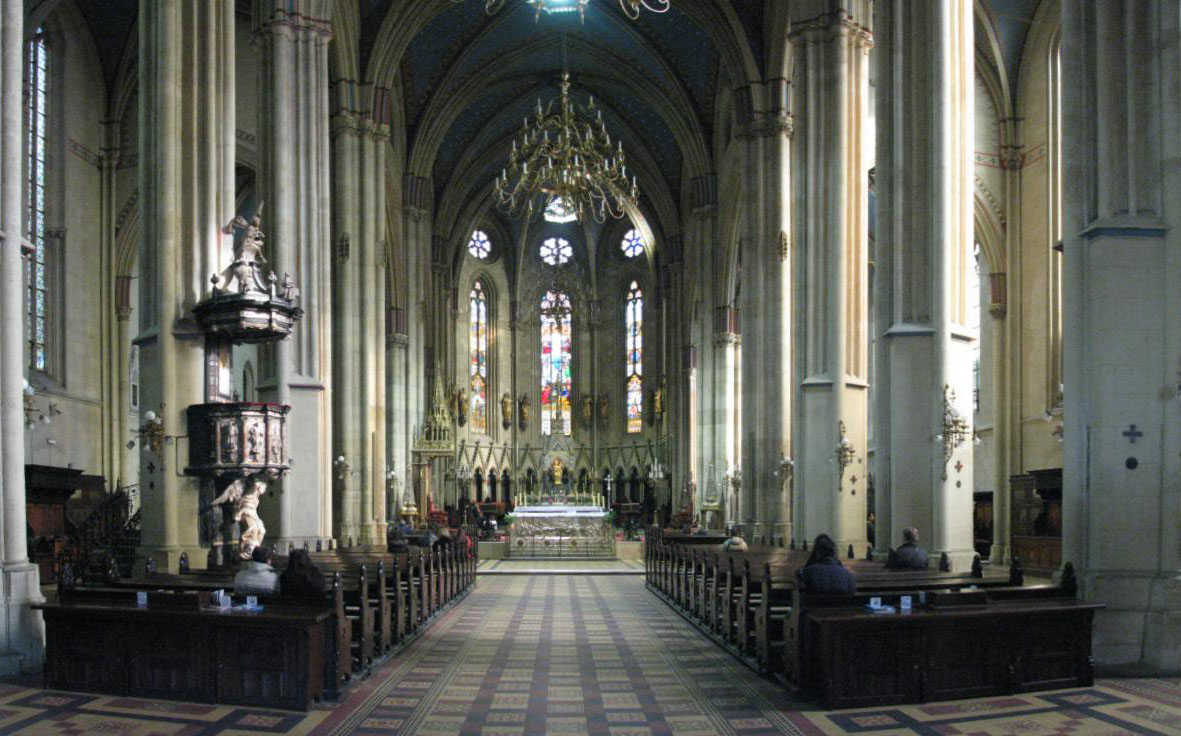 Pogled u Zagrebačku katedralu s glavnog ulaza This panoramic image was created with Autostitch (stitched images may differ from reality).